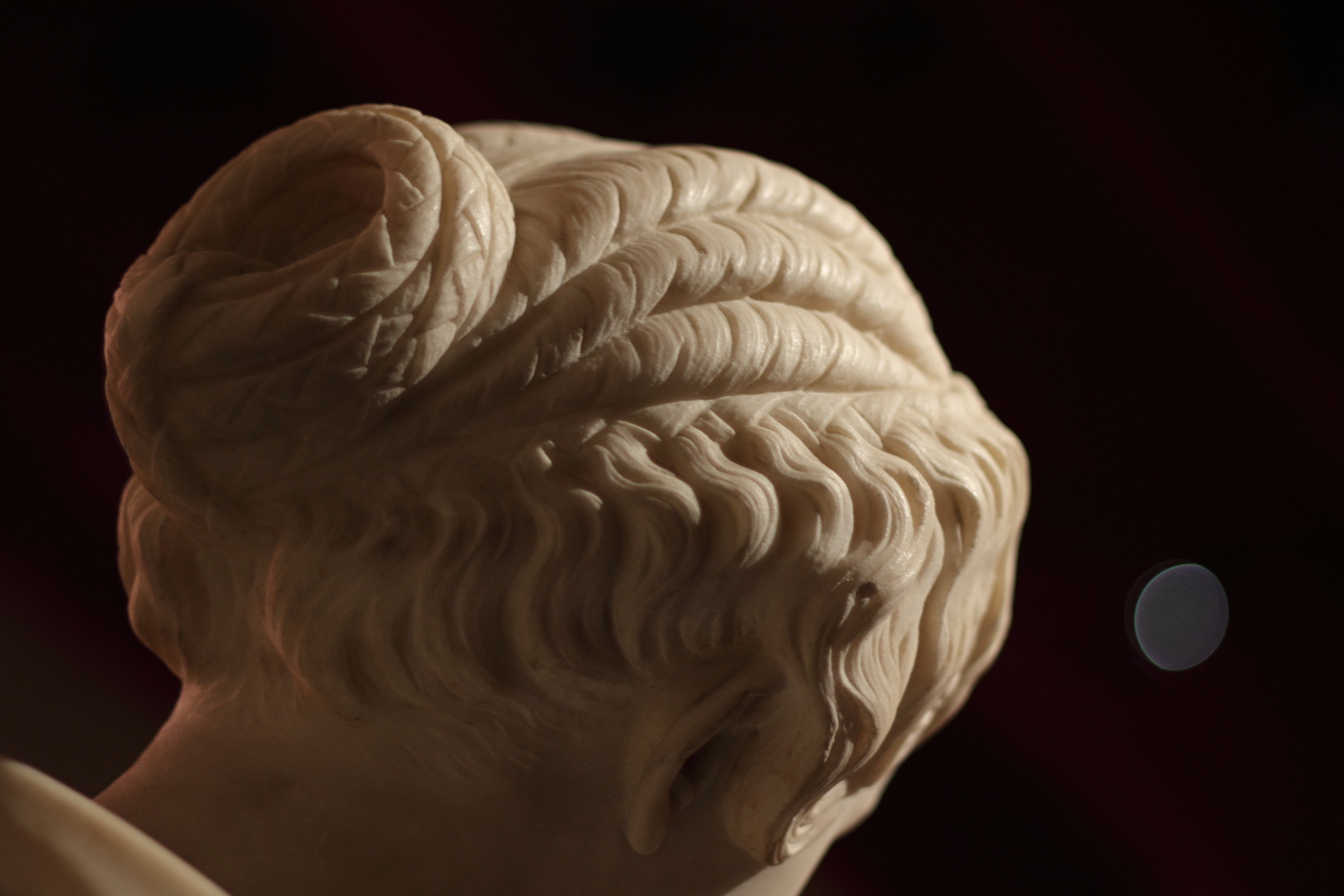 Premier type Photograph taken at: L'Image et le Pouvoir : le siècle des Antonins, Musée Saint-Raymond, 19 November 2011–18 March 2012 .